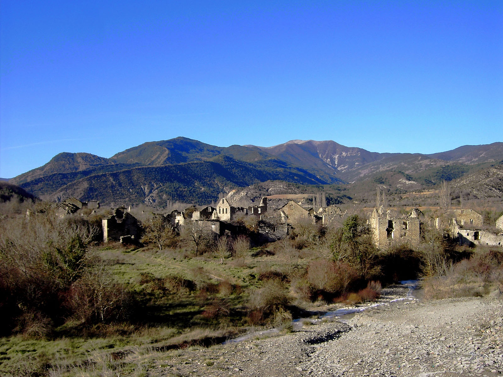 Vista general de Jánovas, pueblo de la Ribera de Fiscal (Valle del Ara, Huesca) que fue íntegramente expropiado en la década de los años 60 con objeto de construir un embalse en interés de la empresa eléctrica Iberduero -actual Iberdrola- (Embalse de Jánovas) el cual jamás fue construido. Muchas de sus casas fueron, además, dinamitadas para evitar el retorno de sus vecinos. Actualmente, superados ya todos los plazos para la construcción de la obra o devolución de las fincas a sus legítimos dueños, el proceso sigue pendiente de resolución.